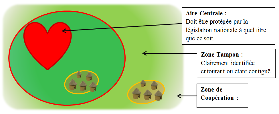 schéma, zone d'une réserve de biosphère, en français